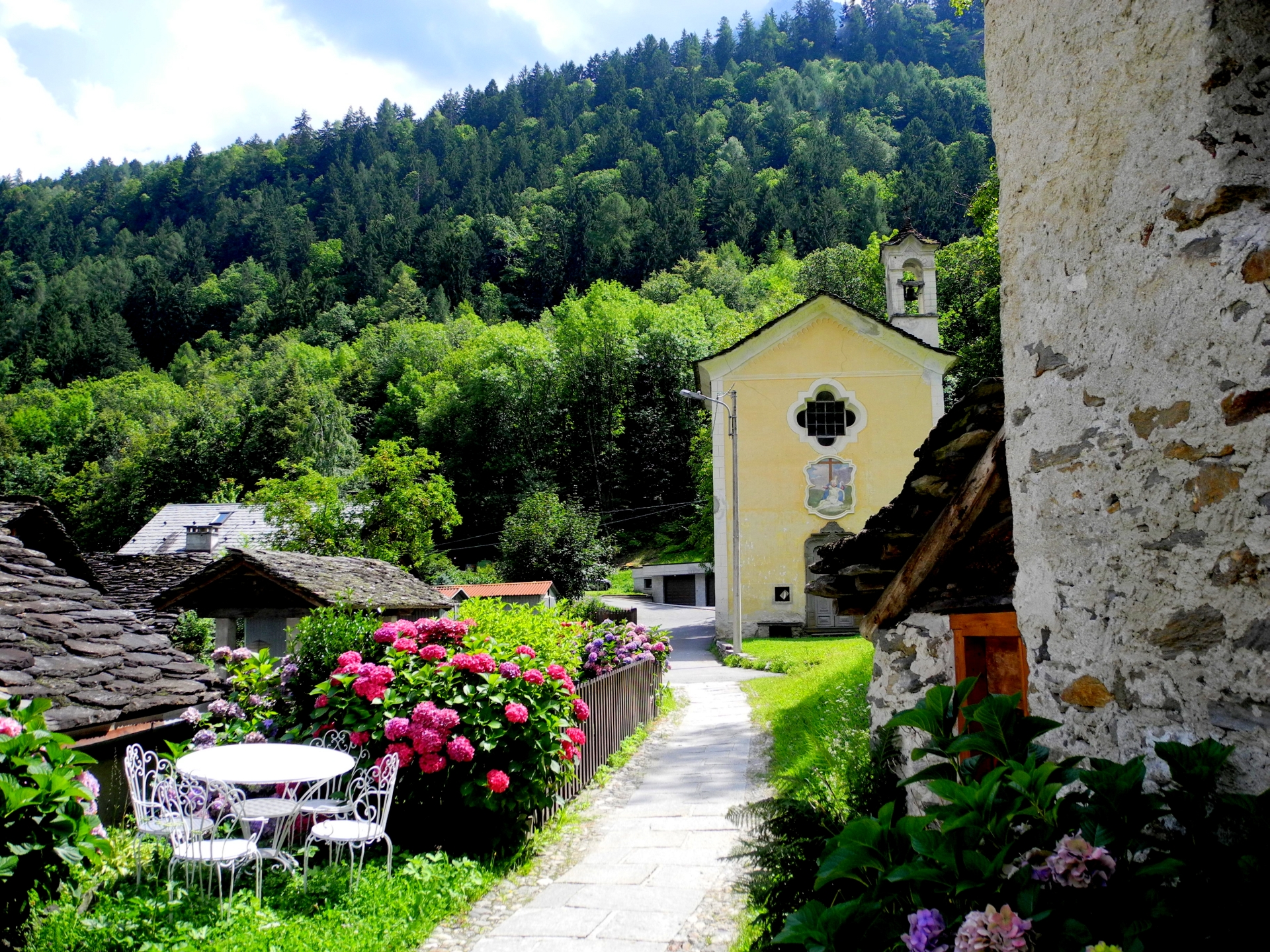 Chiesa di Canete